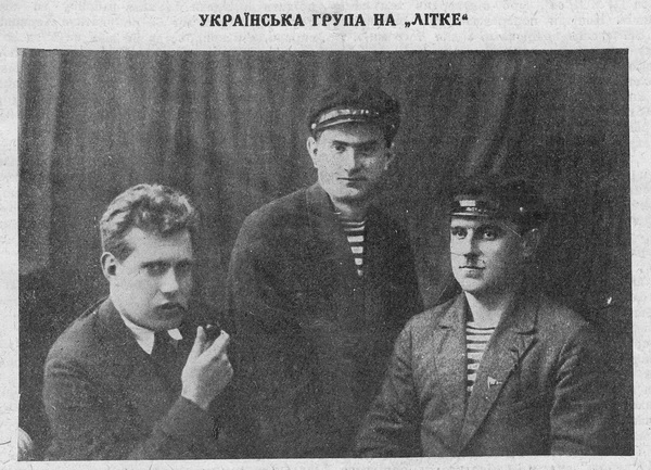 Зліва направо: Олександр Мар’ямов, Павло Радзіховський, Микола Трублаїні.